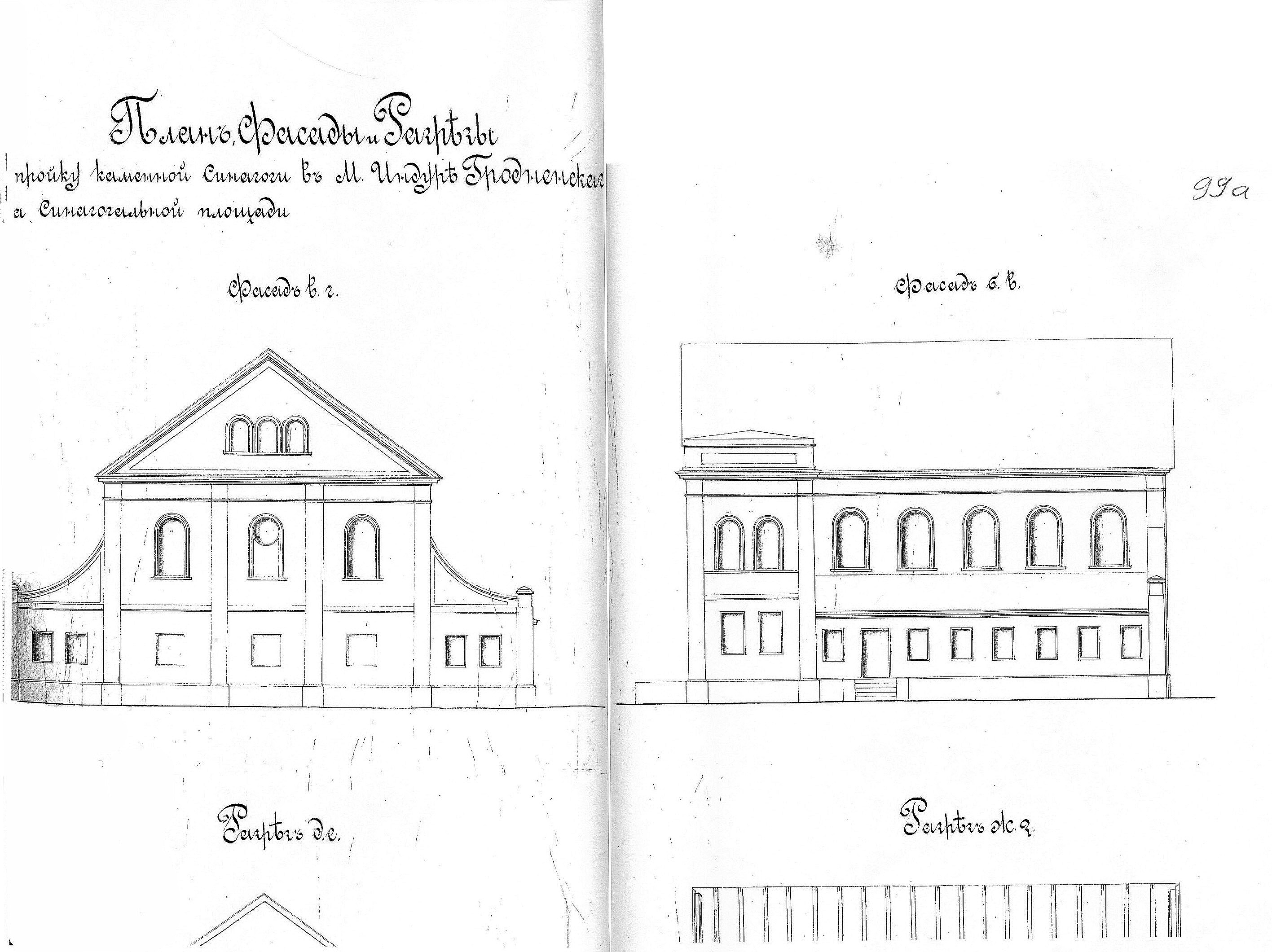 Беларуская (тарашкевіца): Індура (Indura), пляц Сынагогальны (plac Synagogalny). Сынагога